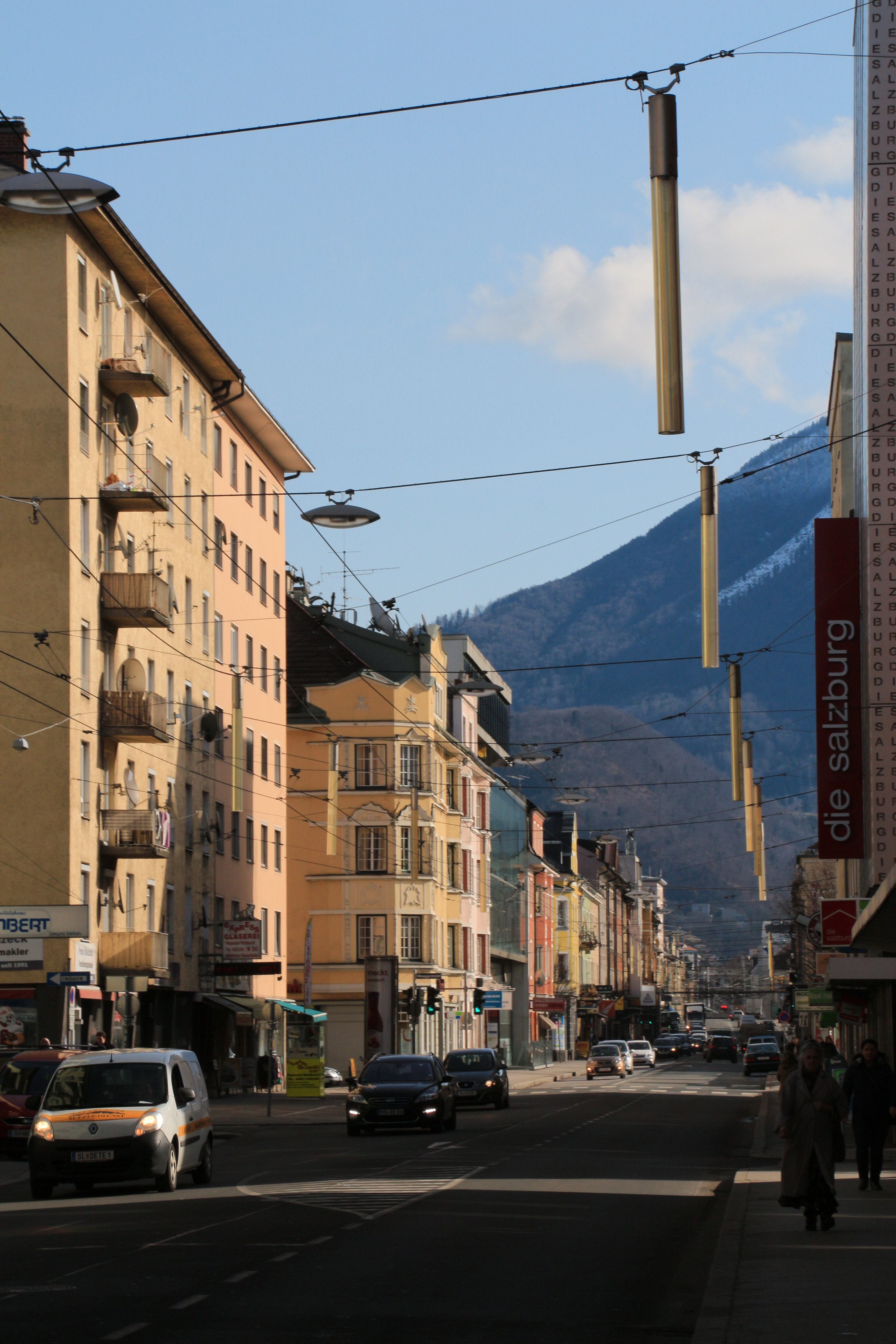 Die Ignaz-Harrer-Straße im Salzburger Stadtteil Lehen, Blichrichtung Osten; im Hintergrund der Gaisberg, davor der Kühberg.